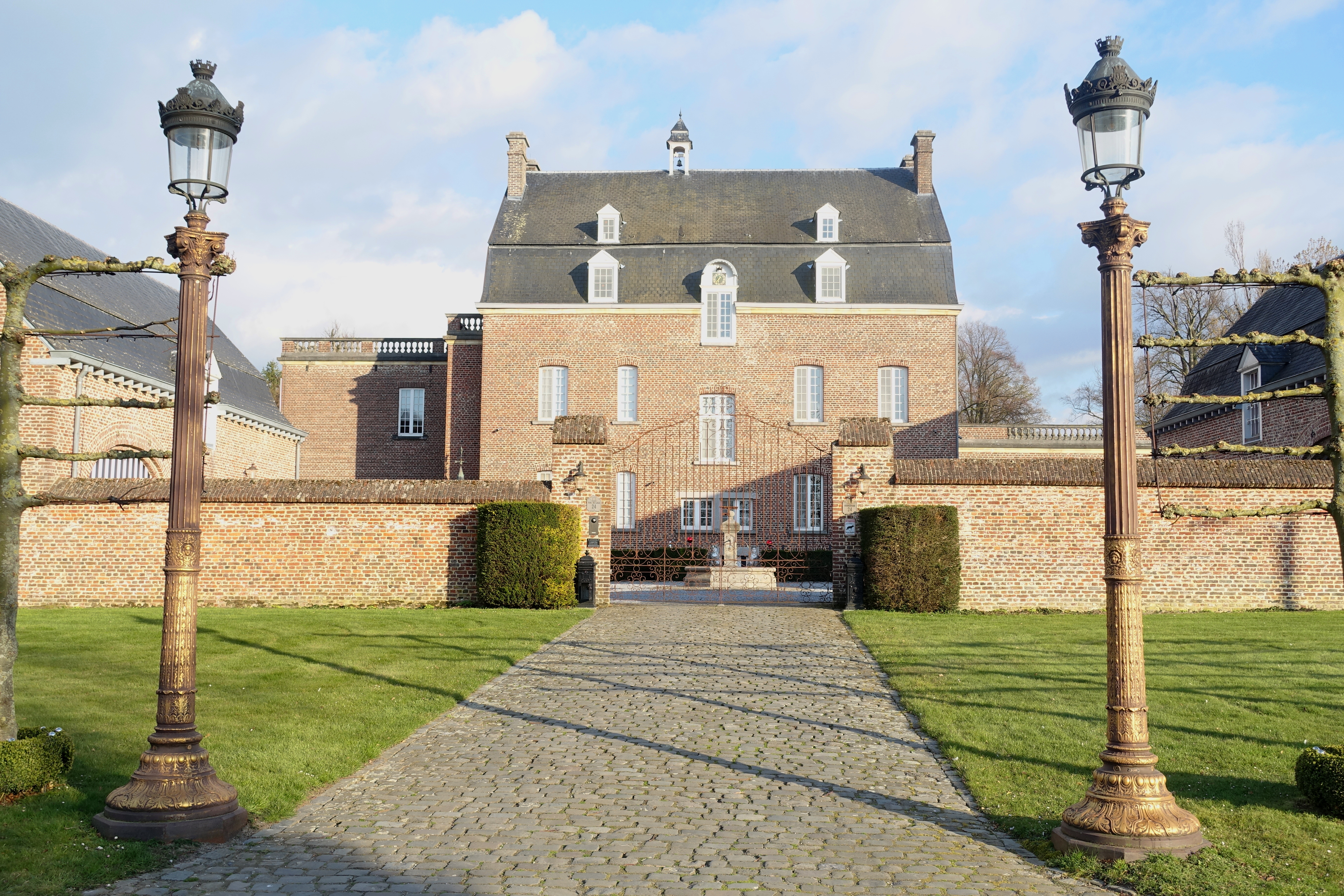 Kasteel Ridderborn in Vliermaalroot (Kortessem) 19de eeuw